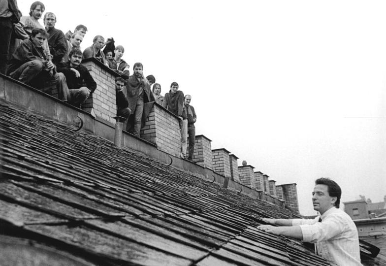 ADN- Wolfgang Kluge 9.7.90 Leipzig: Häftlingsrevolte- Innenminister Peter Michael Diestel (r.) begab sich auf das Dach der Untersuchungshaftanstalt, um Gespräche mit den 49 revoltierenden Häftlingen zu führen, die sich nach dem Einsatz von Tränengas durch die Polizei dorthin zurückgezogen hatten. Die Insassen fordern eine Amnestie, verbesserte Haftbedingungen und die Überprüfung einzelnen Falls.